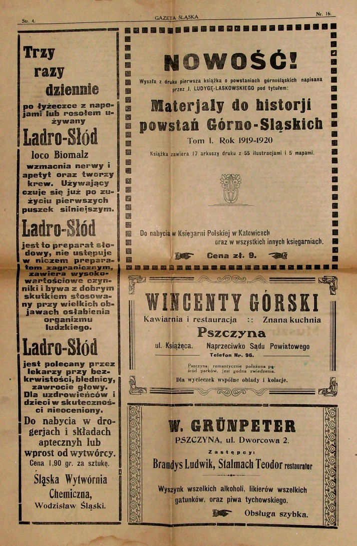 Gazeta Śląska z 1925, nr 16, s. 4